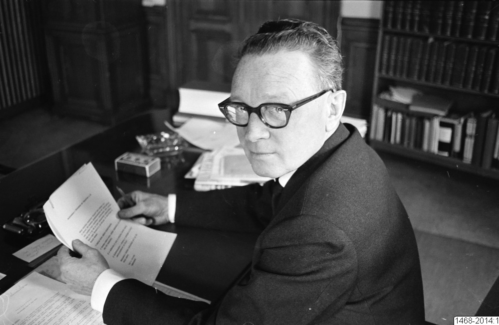 Polismästaren i Helsingborg, Göte Friberg.